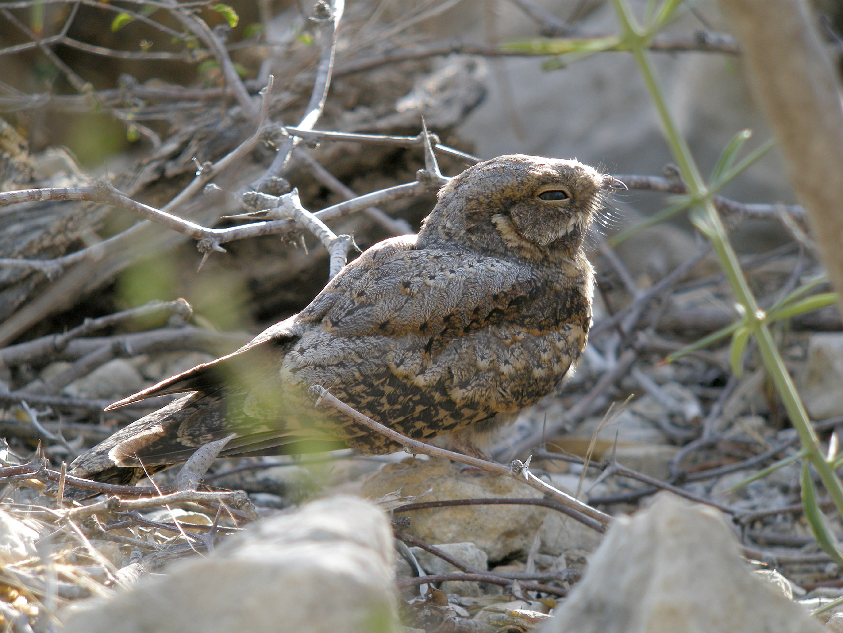 Madagascar Nightjar (Caprimulgus madagascariensis), Tsimanampetsotsa, Madagascar Swarowski 80 HD 30 X, Coolpix P5100 (Adapter DCB)